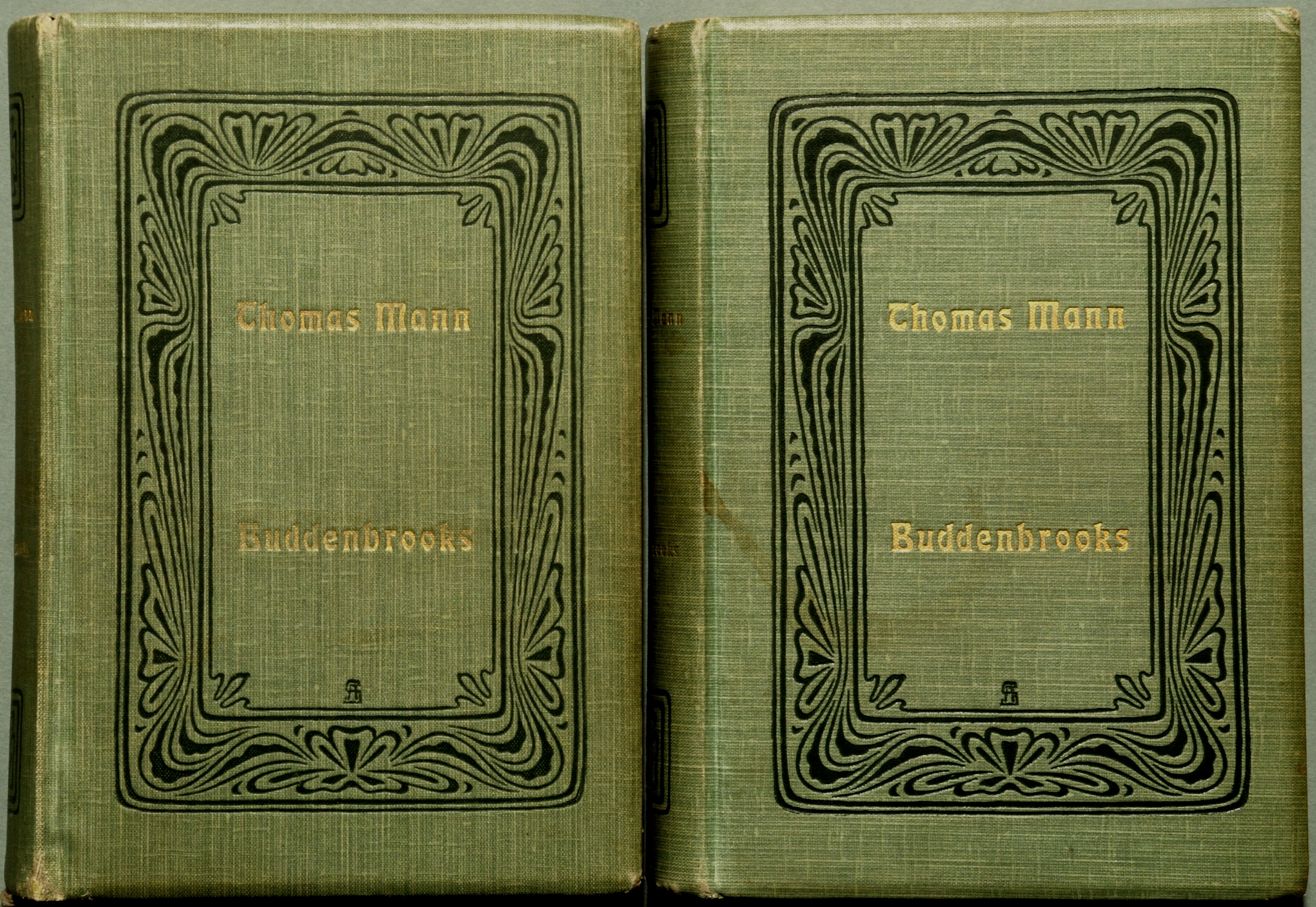 Thomas Mann: Buddenbrooks. Verfall einer Familie. Roman. [1] Original-Einband des Erstdrucks 1901. Berlin: S. Fischer 1901, 2 Bde., 566 + 539 Seiten; Erstausgabe (Potempa D 1 [2], Bürgin I 2, Wilpert/Gühring² 3). Leinen 8° (18,5 x 13 cm). Titel und Autor in Goldprägedruck auf Vorderdeckel und Rücken, Kopfgoldschnitt. Jugendstildekor in schwarzem Prägedruck auf Vorderdeckel und Rücken, Verlagssignet in schwarzem Prägedruck auf dem Hinterdeckel.